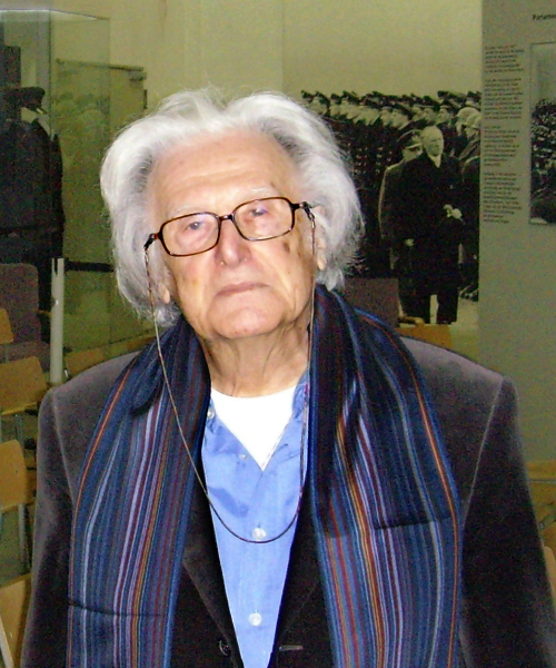 Ralph Giordano im Militärhistorischen Museum der Bundeswehr, Dresden